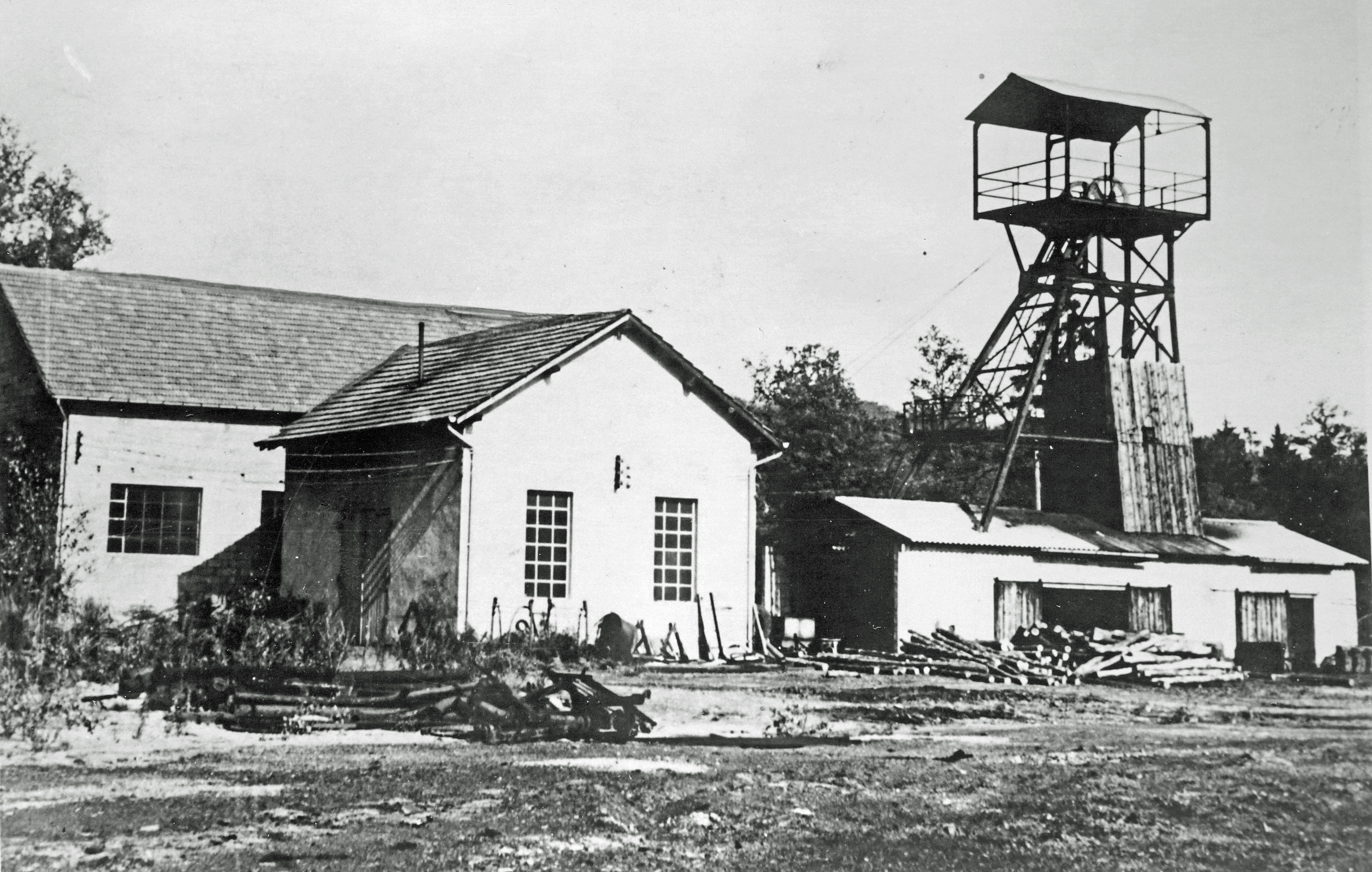 Vue générale du puits de l'Étançon.